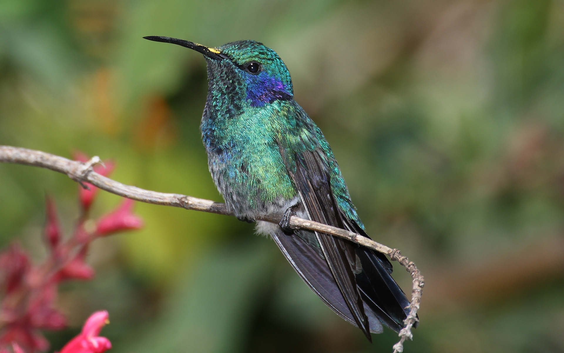 Green Violet-Ear -- Finca Lerida, Boquete, Panama -- 2008 January